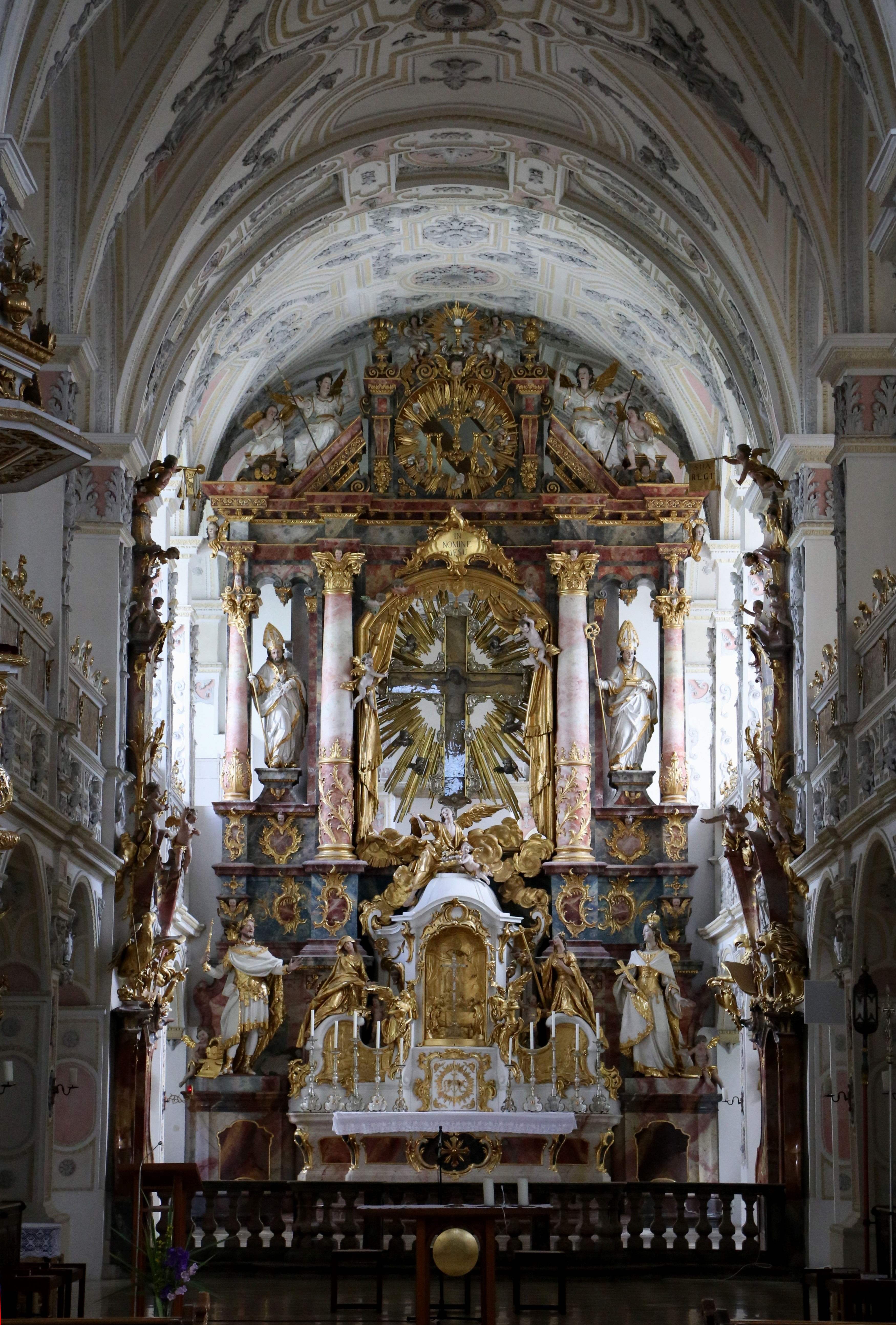 Kloster Polling; ehem. Stiftskirche St. Salvator und Hl. Kreuz, jetzt kath. Pfarrkirche, spätgotische Hallenkirche zu drei Schiffen mit stark eingezogenem gerade schließendem Chor und angefügten Nebenräumen, Neubau 1416/20, 1621/28 Barockisierung und Erweiterung nach Osten durch einen dreijochigen Umgangschor nach Plänen von Hans Krumpper, Neugestaltung der Westfassade 1727/28 durch Joseph Schmuzer, Turm im Stil der Renaissance nach Hans Krumpper 1603/10, Turmabschluss 1822 durch Oktogon mit Zeltdach; mit Ausstattung